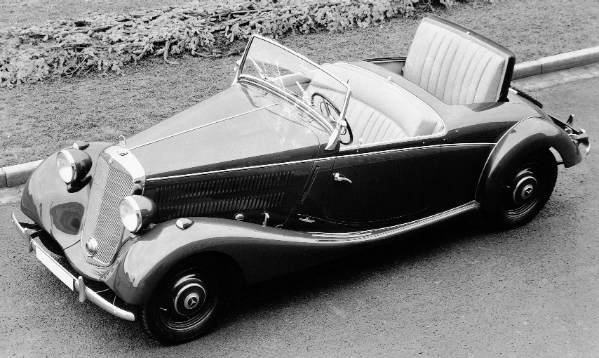 Bildbeschreibung: Roadster, 1939-1940 Quelle: Mediaseite der DaimlerChryslerAG Genehmigung: Gern können Sie für Ihre Tätigkeit für die Wikipedia Inhalte der DaimlerChrysler Medienseiten verwenden. Dazu erkennen wir die Bedingungen nach GNU-FDL an. Das Angebot bezieht sich auch auf die vorhandenen Bilder.(Dr.Josef Ernst, Communications, DaimlerChrysler AG)